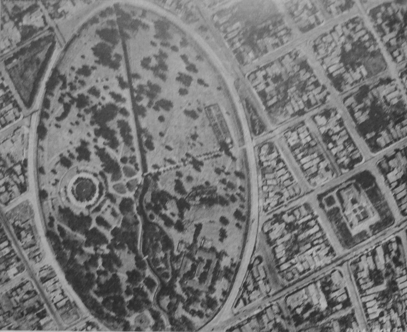 Vista a vuelo de pájaro del Parque Savedra y su barrio homónimo, en la ciudad de Buenos Aires. Al momento en que se tomó la fotografía, la densidad poblacional del lugar era de apenas 100 habitantes por hectárea. En sentido vertical se puede ver el Arroyo Medrano a cielo abierto. Actualmente está entubado y es subterráneo.